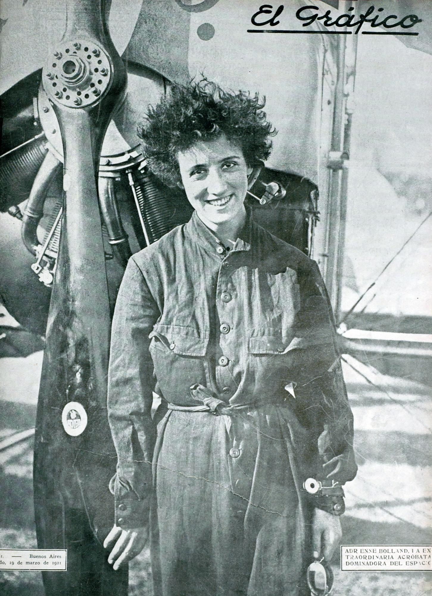 El Grafico del 19 de Marzo de 1921. Edicion 91